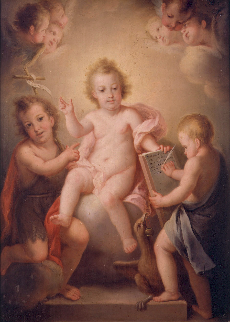 La obra representa al Niño Jesús acompañado por San Juan Bautista y por San Juan Evangelista.